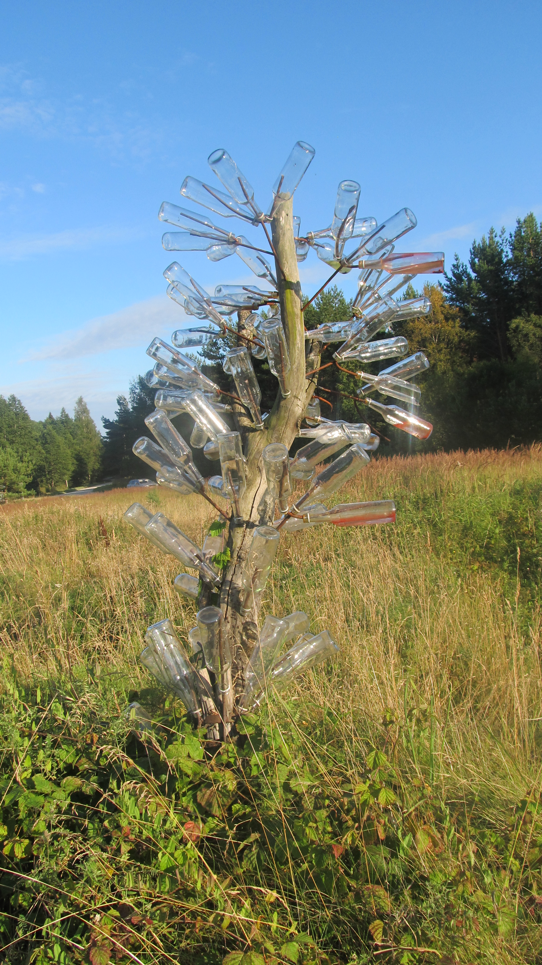 Hüti klaasikoja asukoht